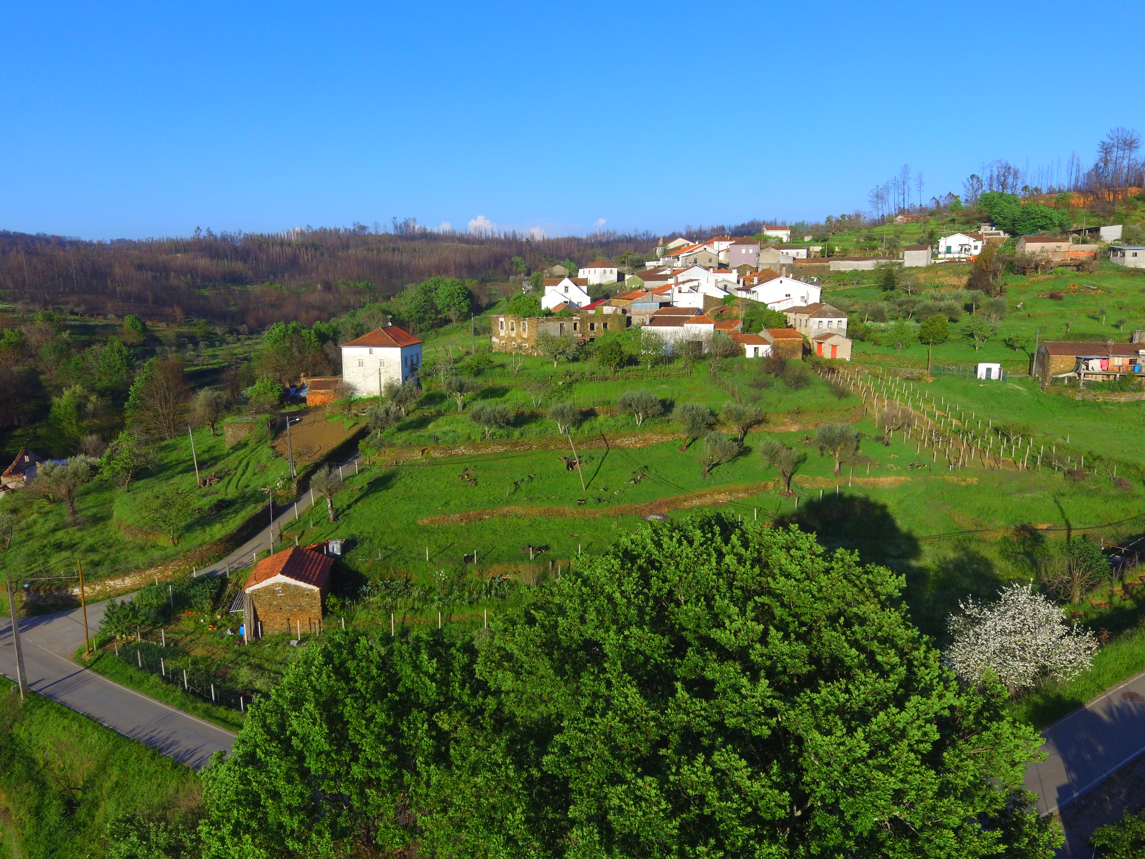 Vista aérea de drone, tirada de oeste para este